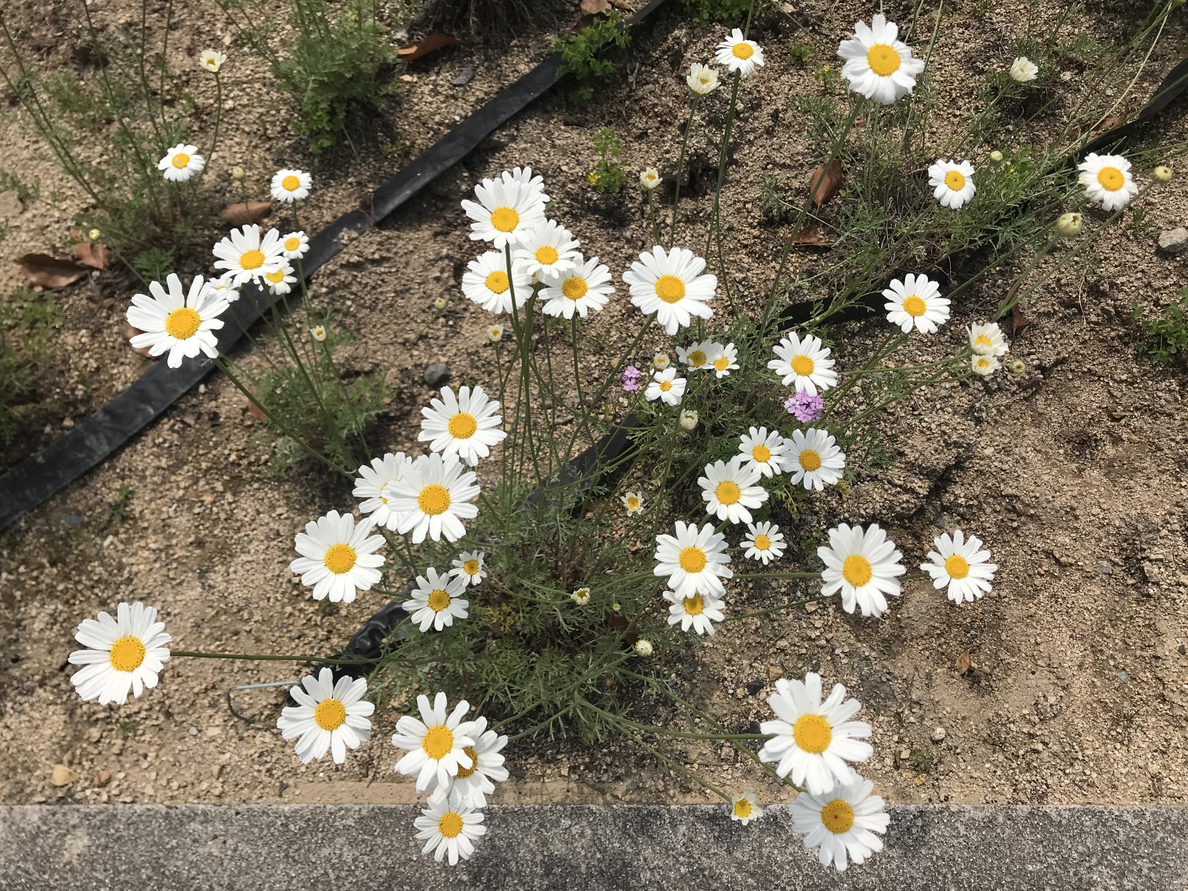 シロバナムシヨケギク